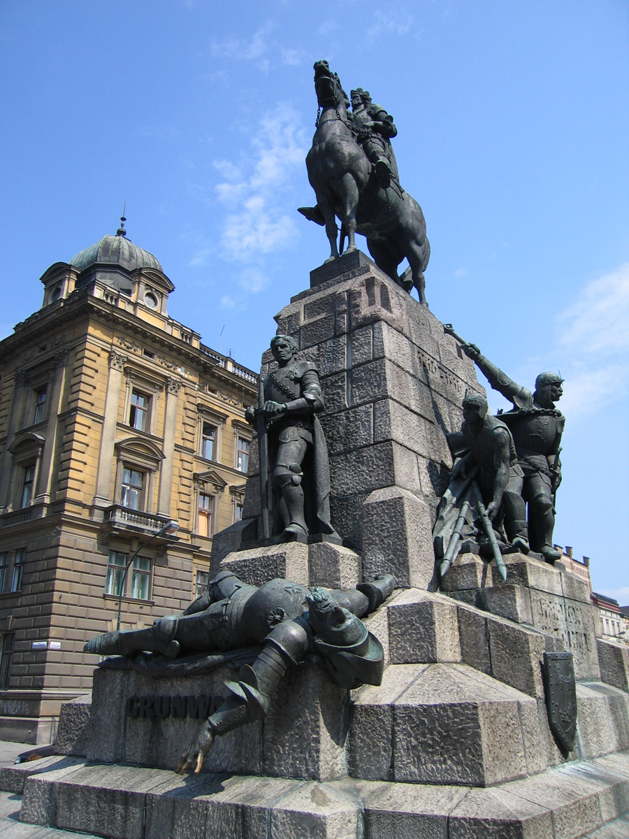 Grunwald (Žalgiris) monument in Krakow